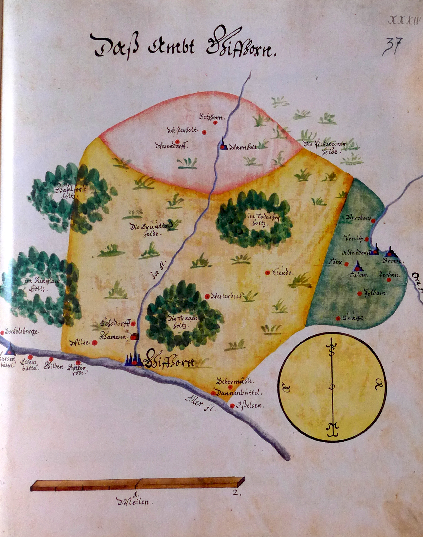 Ämteratlas des Fürstentums Lüneburg von Johannes Mellinger, um 1600 – Reproduktion der im Niedersächsischen Landesarchiv, Abteilung Hannover, lagernden Kopie um 1678 (vgl.